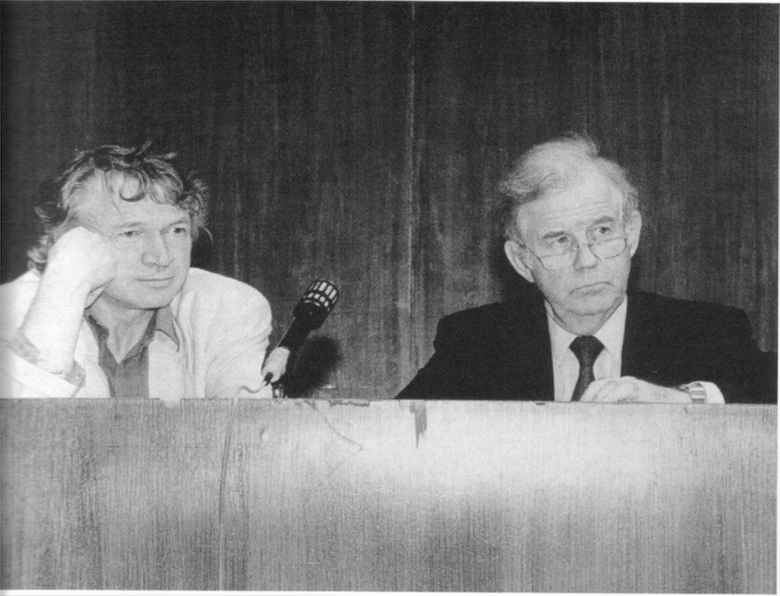 Prof. Rudolf Bahro und Prof. Kurt Biedenkopf im Juli 1991 bei einer gemeinsamen Vorlesung im Zyklus "Sozialökologie" an der Humboldt-Universität Berlin